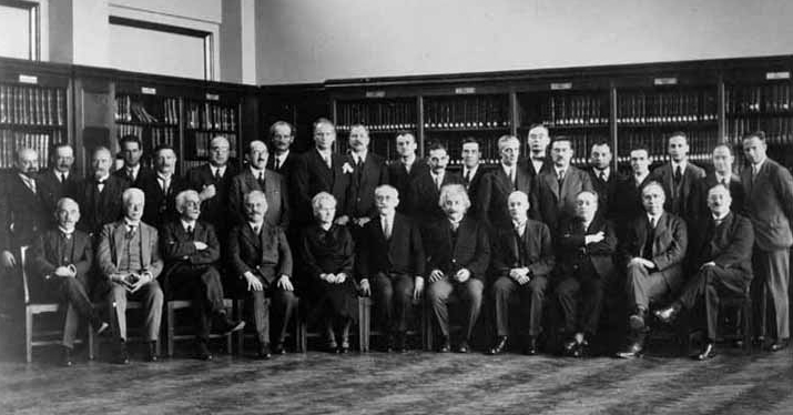 Sixth Solvay Conference on Physics, Brussels, 1930 standing, from left to right E. Herzen, É. Henriot, J. Verschaffelt, C. Manneback, A. Cotton, J. Errera, O. Stern, A. Piccard, W. Gerlach, C. Darwin, P.A.M. Dirac, E. Bauer, P. Kapitsa, L. Brillouin, H. A. Kramers, P. Debye, W. Pauli, J. Dorfman, J. H. Van Vleck, E. Fermi, W. Heisenberg sitting, from left to right Th. De Donder, P. Zeeman, P. Weiss, A. Sommerfeld, M. Curie, P. Langevin, A. Einstein, O. Richardson, B. Cabrera, N. Bohr, W. J. De Haas